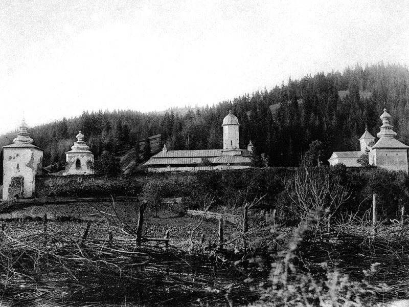 Slatina Monastery